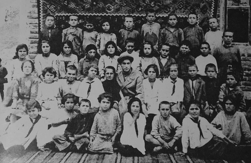 Академик НАН РА Вараздат Аруюнян со своим классомм (учительские года)